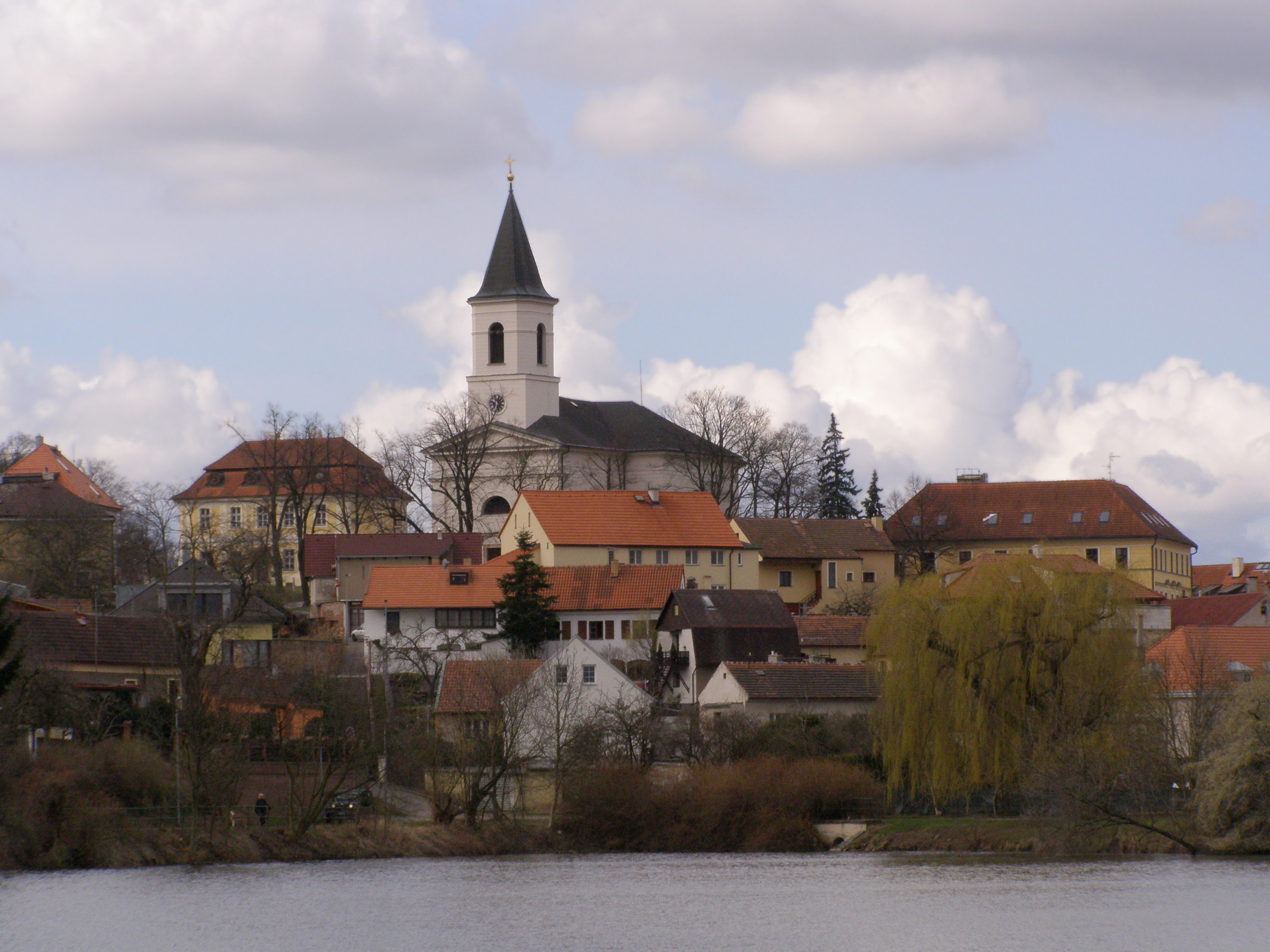 Praha,Liboc, pohled od Libockého rybníku na Kostel svatého Fabiána a Šebestiána